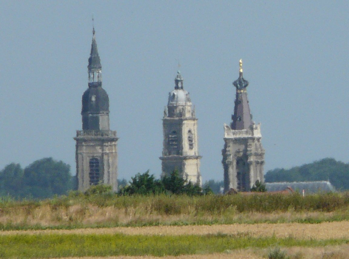 Les 3 clochers caractéristiques de Cambrai : de gauche à droite l'église Saint-Géry, le beffroi, la cathédrale Notre-Dame